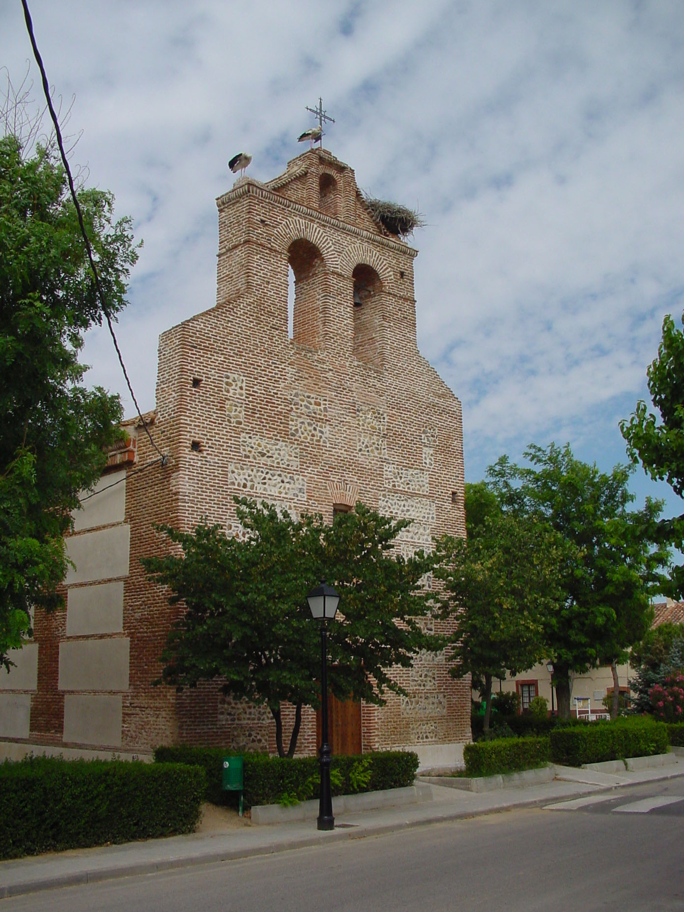 Iglesia Parroquial de San Esteban, en Sarracines, pedanía de Fresno de Torote.